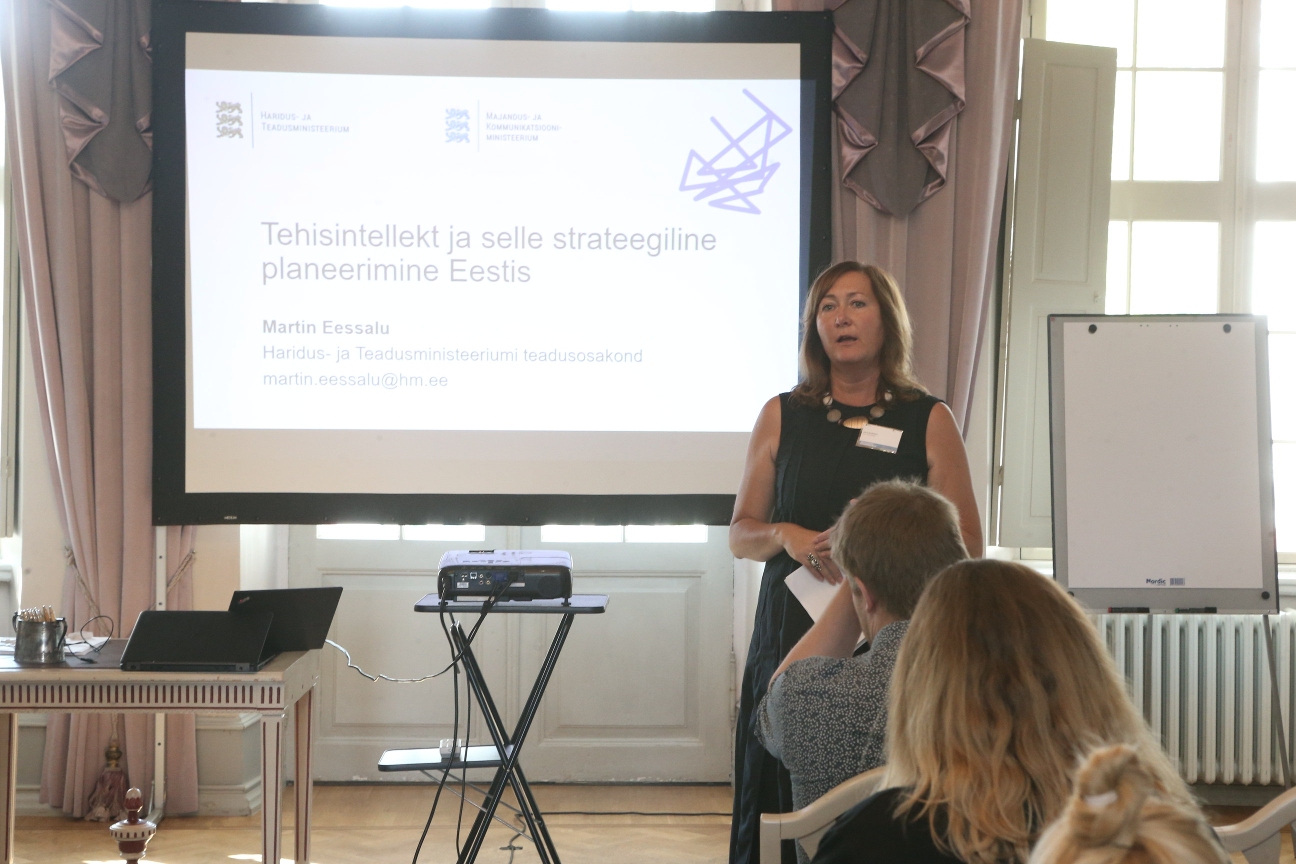 Eesti mäluasutuste suveseminar Sagadi mõisas Lääne-Virumaal pealkirjaga "Inimesed, andmed ja kratid – nende koostoimimise võimalikkusest". Seminari juhatab sisse Janne Andresoo.